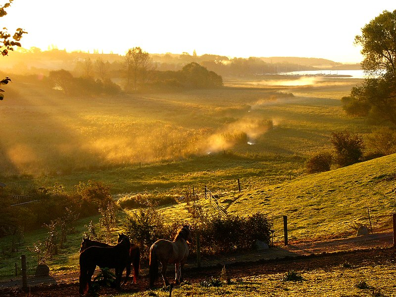 Syltemaen, landskab ved den fynske kyst.